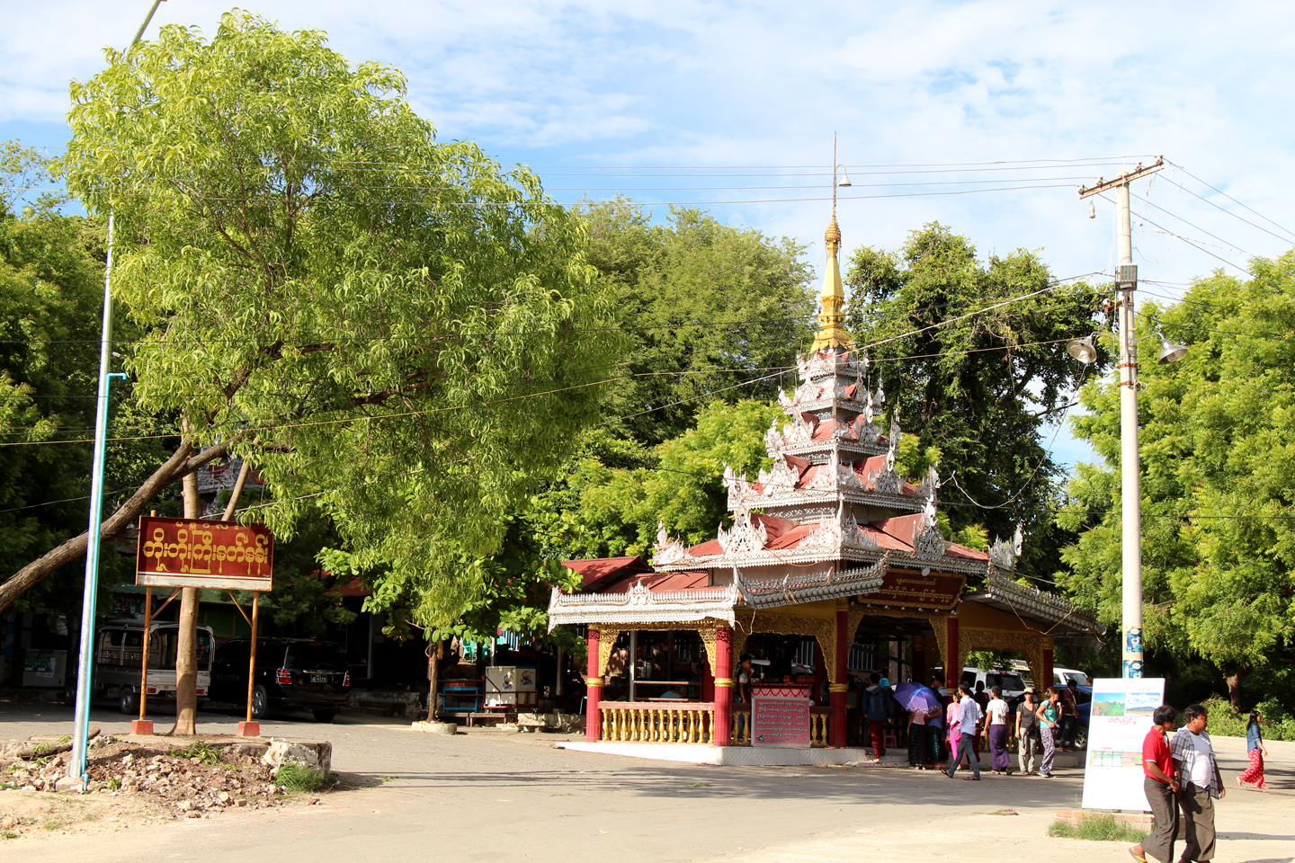 မြန်မာဘာသာ: မန္တလေးတောင်ခြေရှိ ဘိုးဘိုးကြီးနတ်နန်း